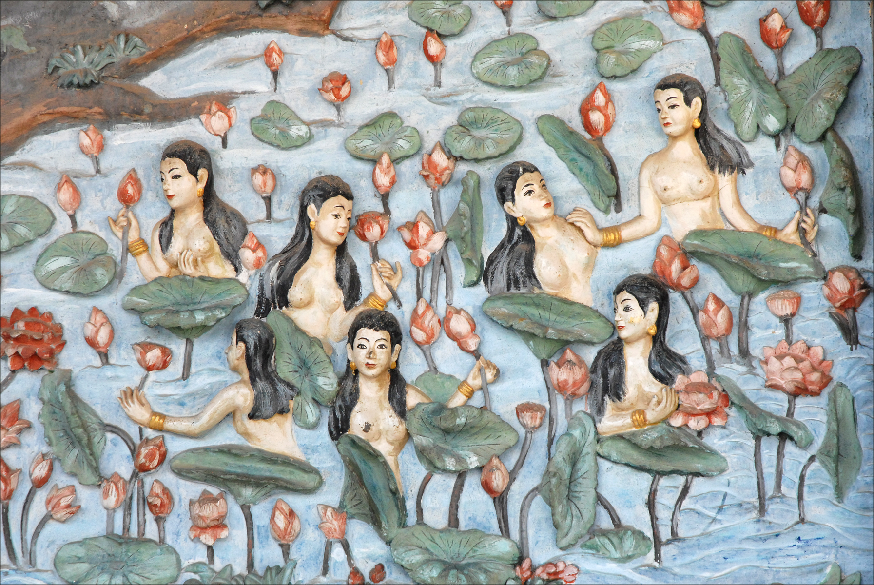 Les Kinnari en train de se baigner. Les kinnari, comme les apsara, sont des divinités secondaires. La partie supérieure de leur corps est celle d'une femme, et la partie inférieure celle d'un oiseau. La légende du Roi Thao Sisouthone et de Nang Manola est représentée sous le porche. Le Vat That doit son nom à un stupa construit par la Reine mère du Roi Sayasetthathirat au milieu du 16ème siècle.